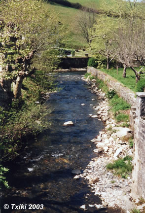 Rivière Lapitxuri à Dancharia Pyrénées).